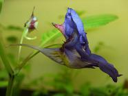 Egil J. Skarning